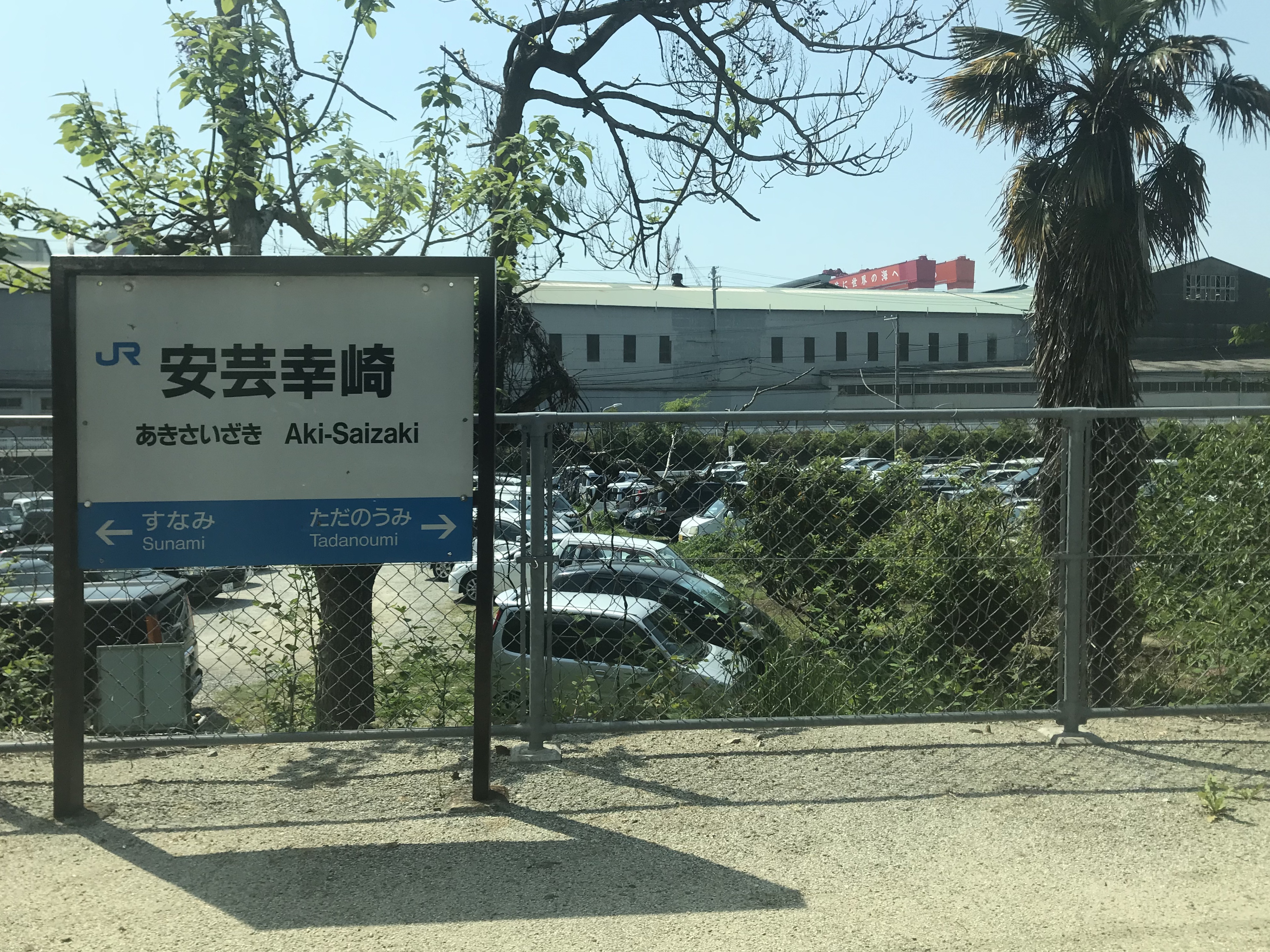 呉線の列車内より望む安芸幸崎駅のホームと駅名標。後ろは今治造船広島工場